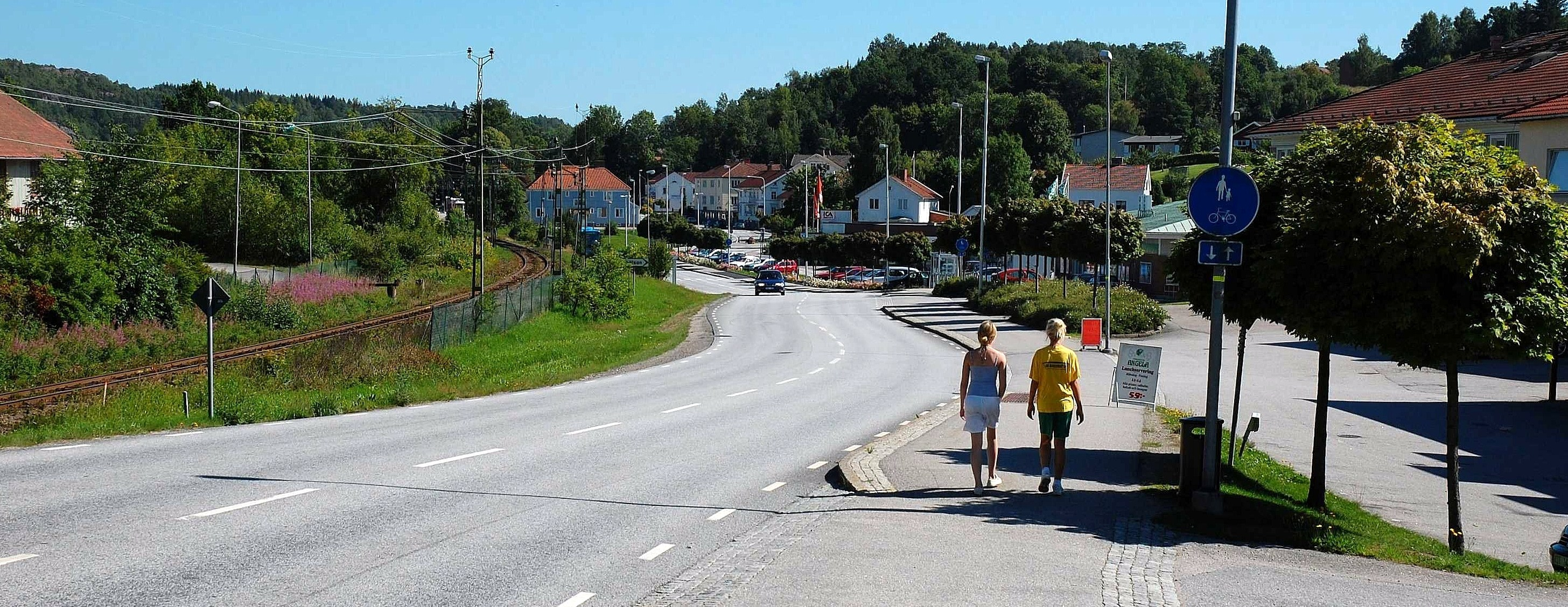 Munkedal, centrum